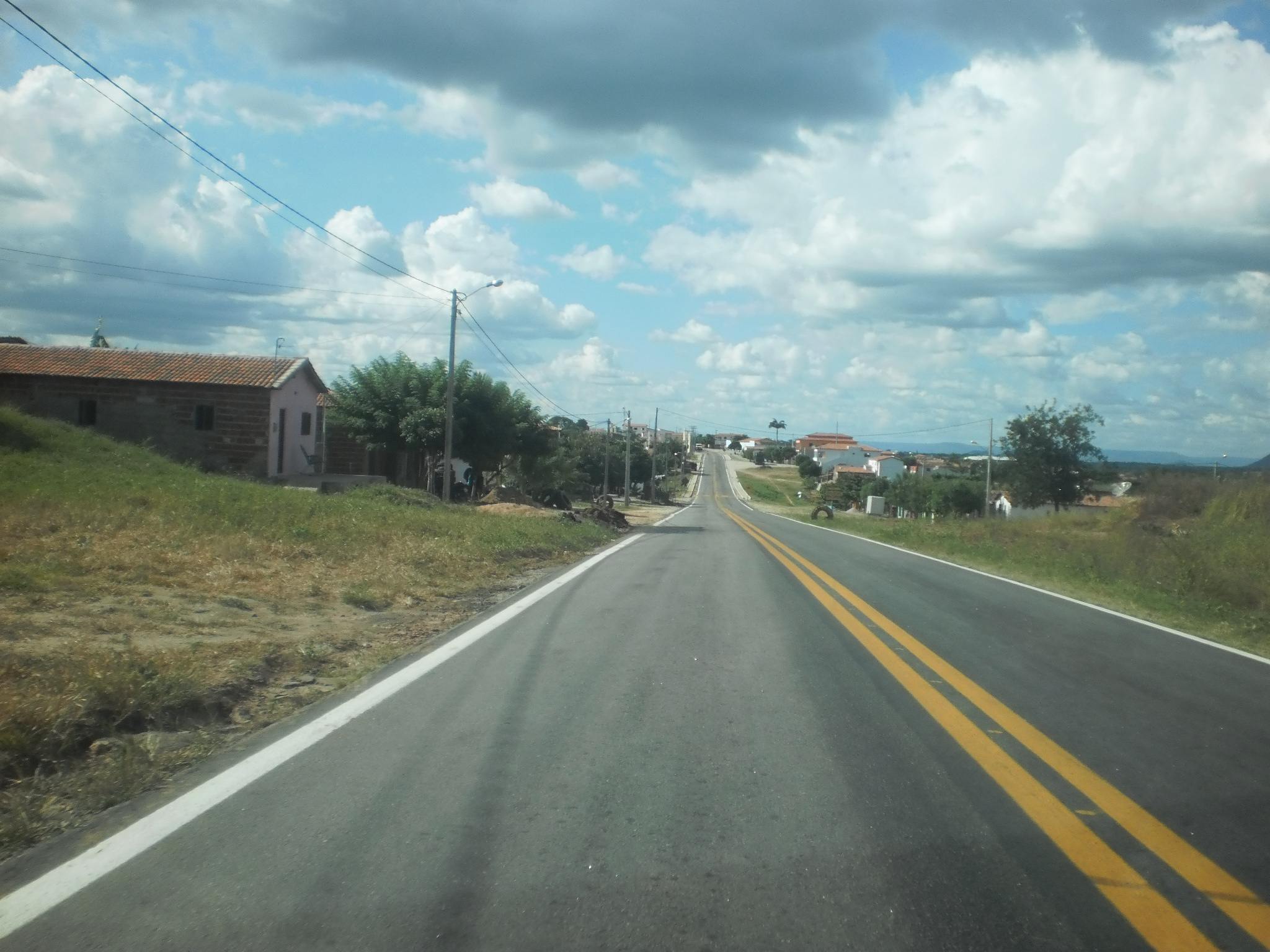 Vista panorâmica de José da Penha (Rio Grande do Norte, Brasil) a partir da BR-405, na entrada da cidade (sentido sul-norte).